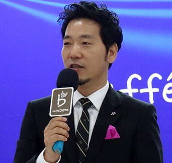 카페베네 글로벌 로스팅 플랜트 준공식 기자간담회